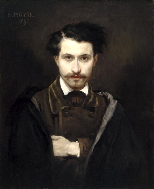 Édouard Moyse autoportrait 1853